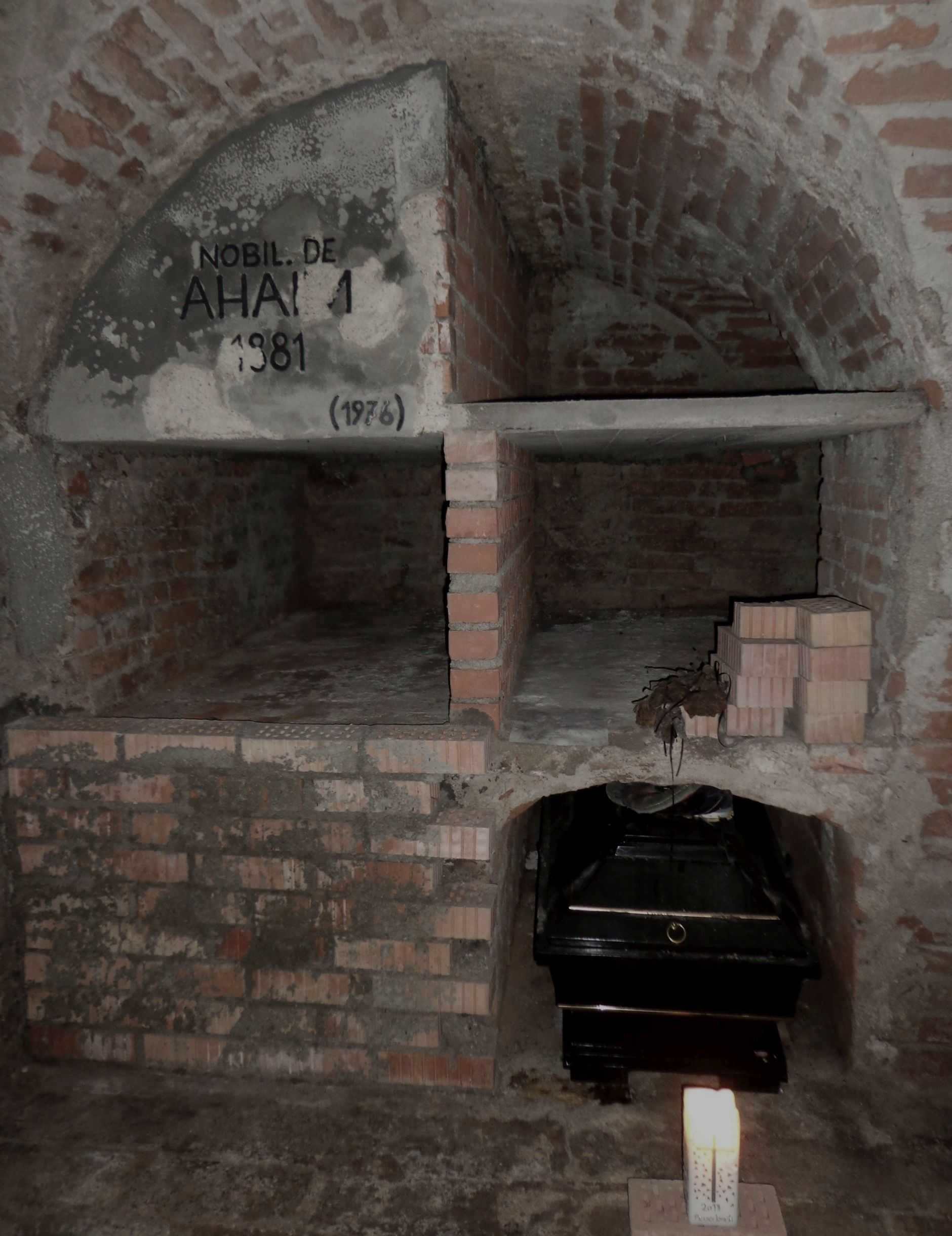 Prälatengruft/Pröpstegruft in der Stiftskirche Reichersberg: oben links Überreste der Grafen von Aham, unten links Propst Odulf Danecker, unten rechts Propst Werner Thanecker